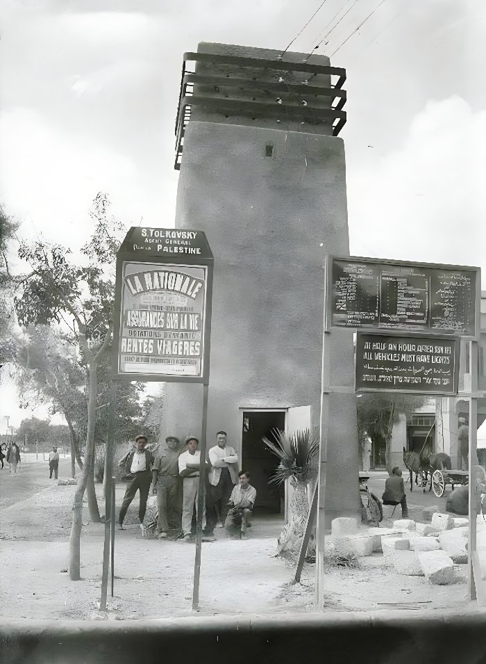 תחנת טרנספורמציה ביפו, 1924. מתכנן התחנה היה האדריכל ריכרד קאופמן